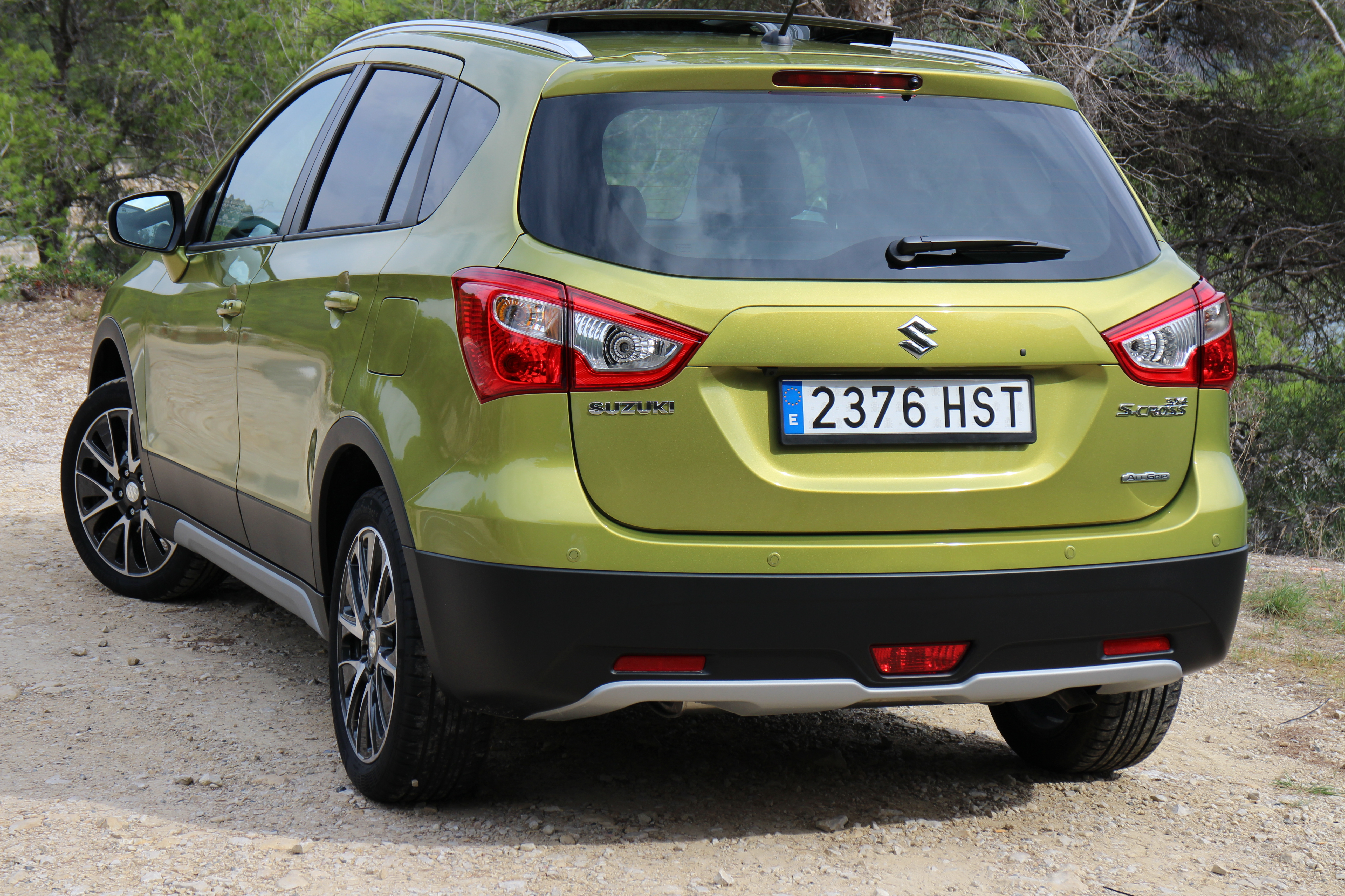 Suzuki SX4 S-Cross